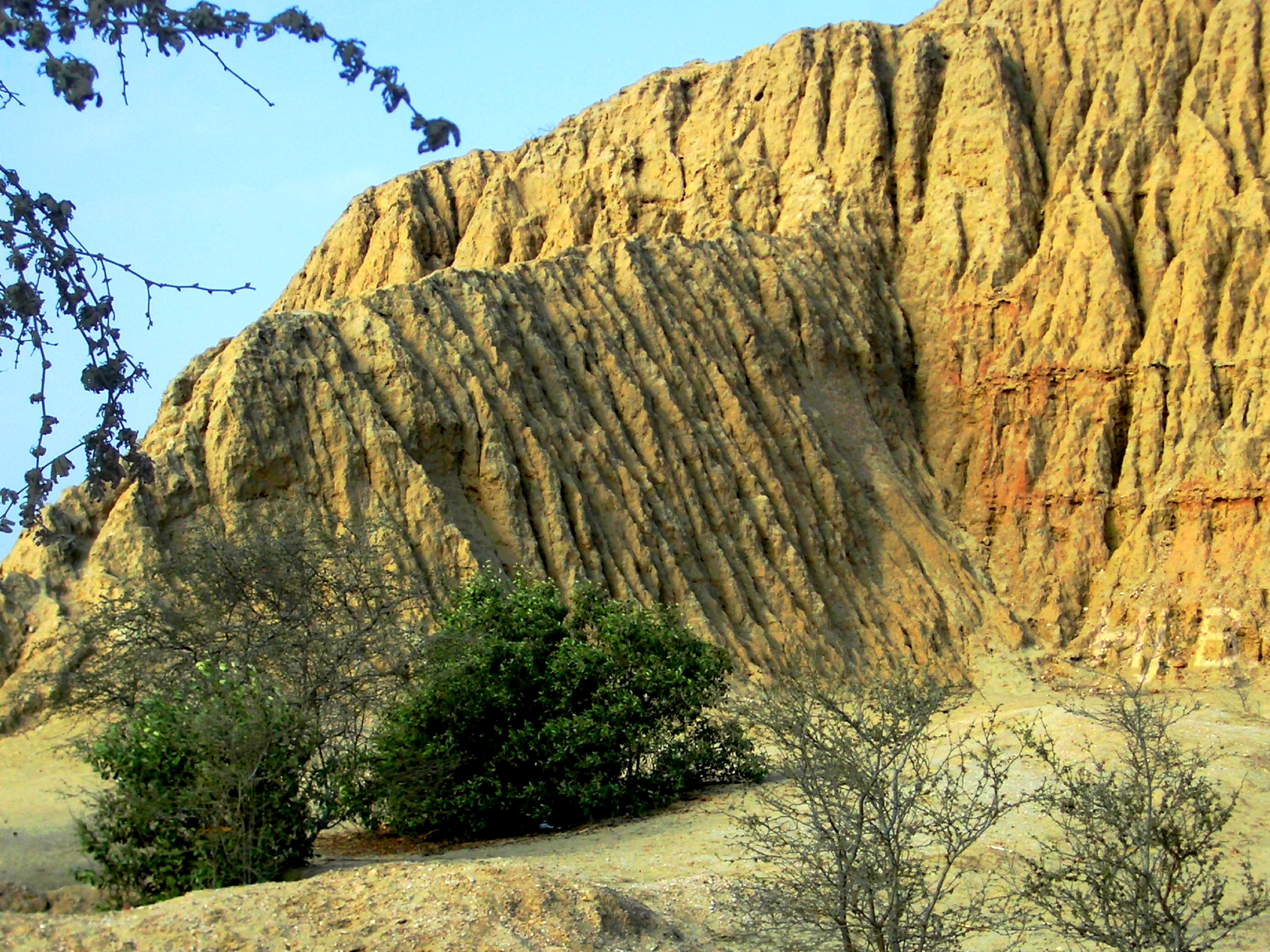 Huaca mit starker Erosion (Túcume / Nordperu)